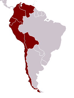 Mapa com os países andinos, ou seja, da América Andina.